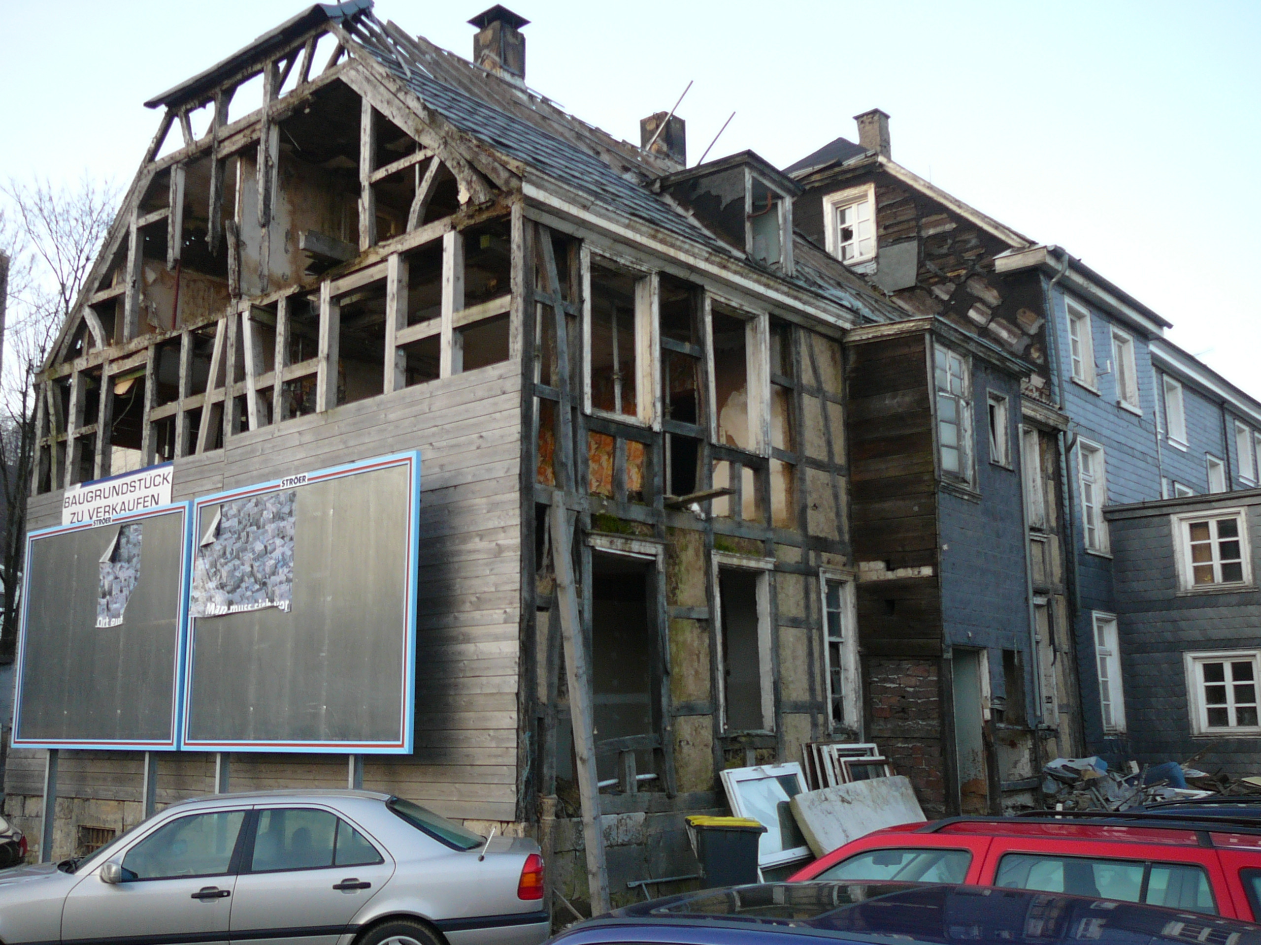 Friedrich-Engels-Allee, Wuppertal